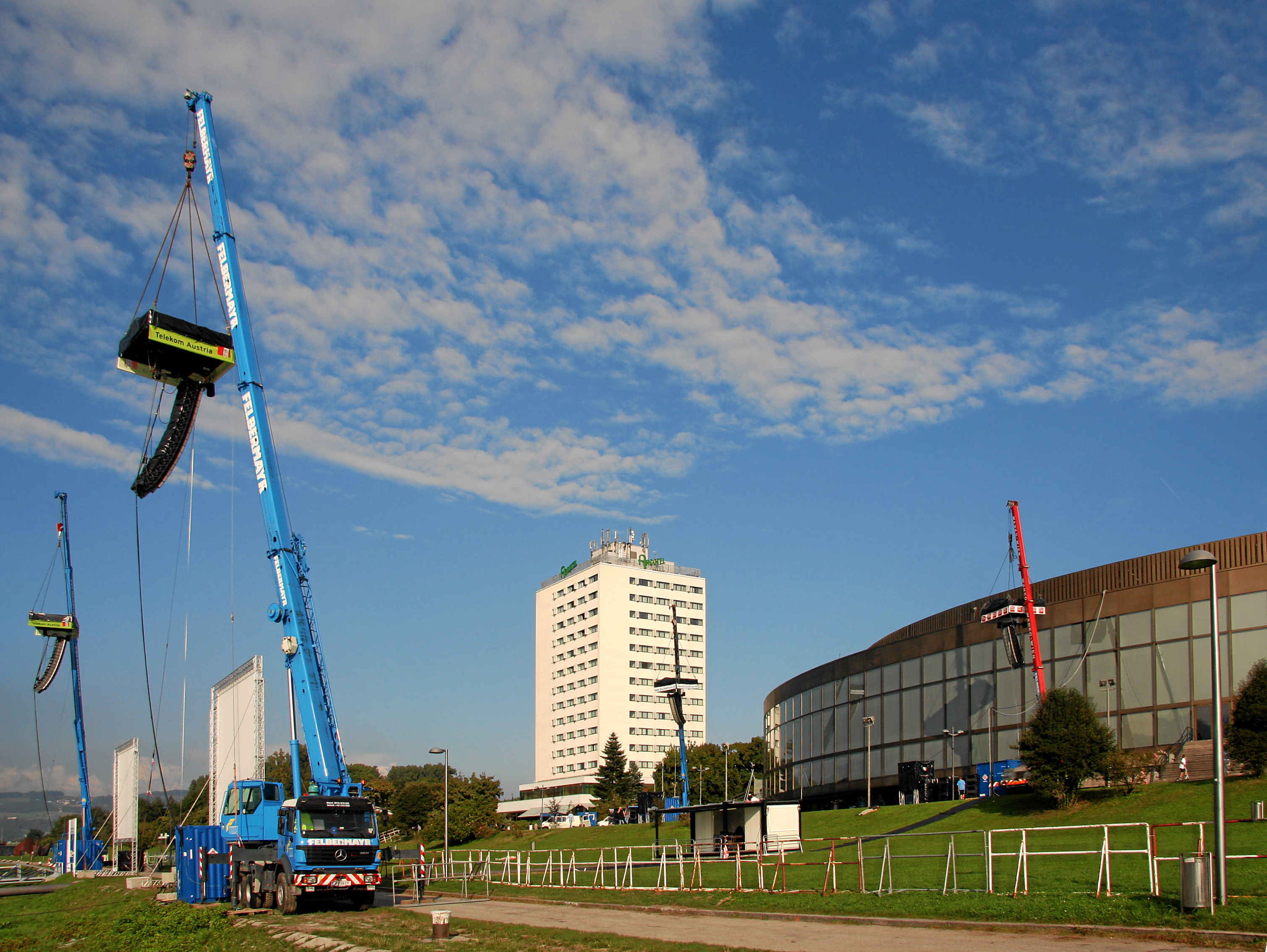 Lautsprecheranordnung für die klassische Linzer Klangwolke 2005